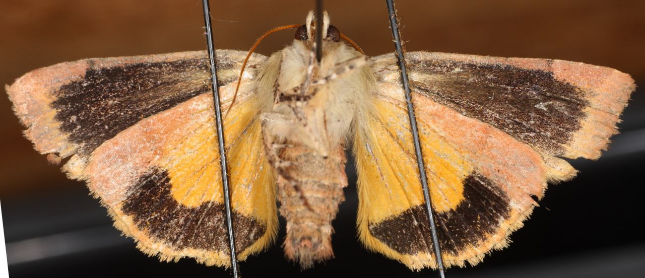 Underside. Fiolett båndfly Noctua janthe skilles fra den nærstående N. janthina på stor fargekontrast under forvingene.Template:Byline